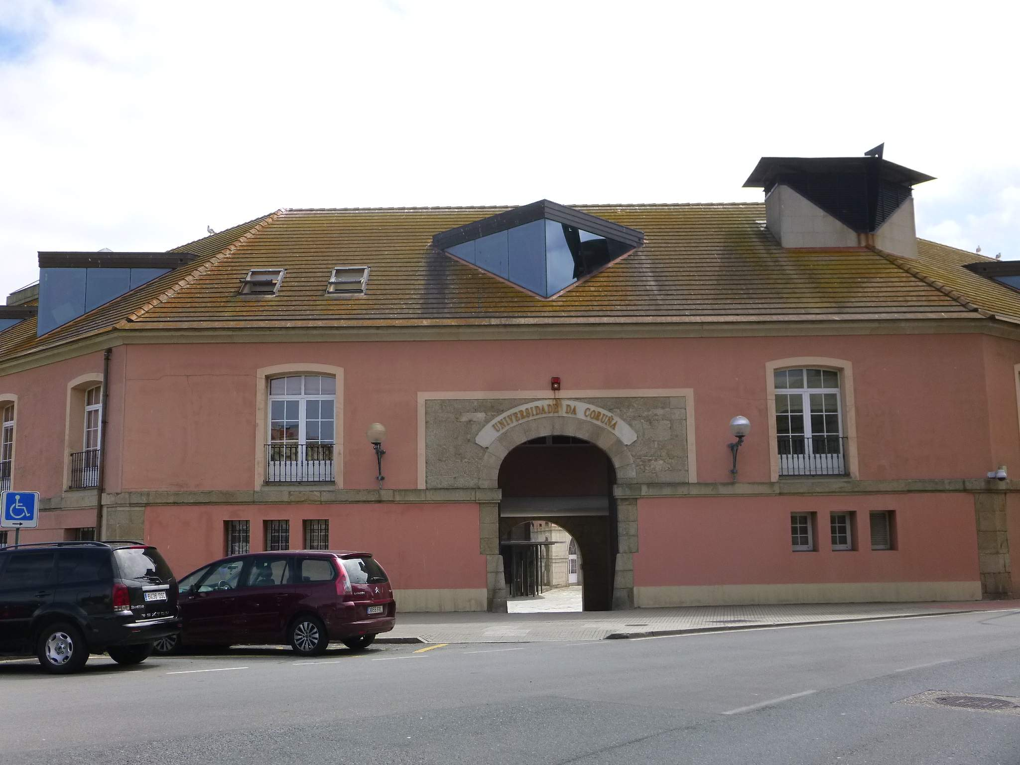 A Coruña - Universidade da Coruña